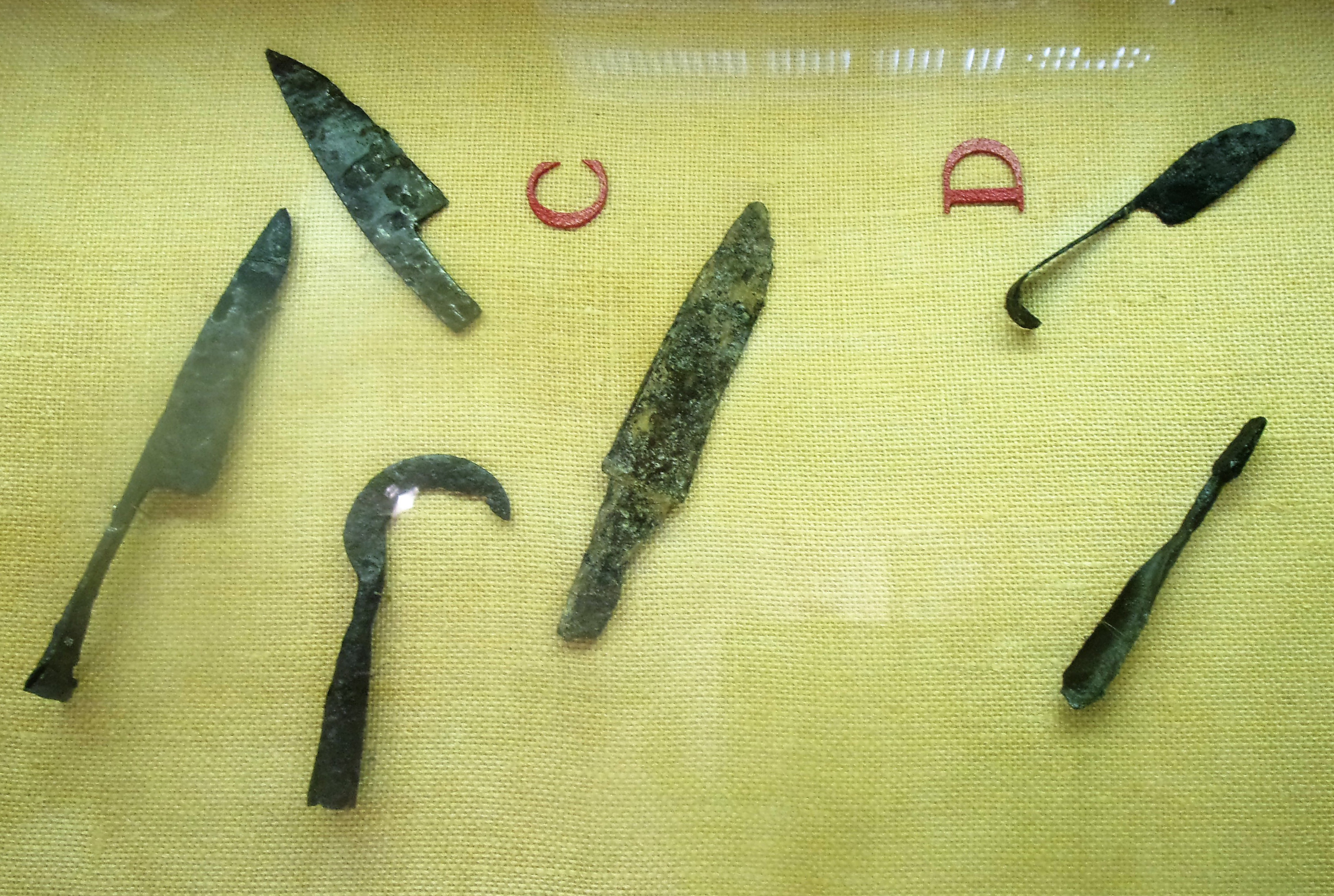 Outils agricoles antiques en métal provenant de Tasciaca